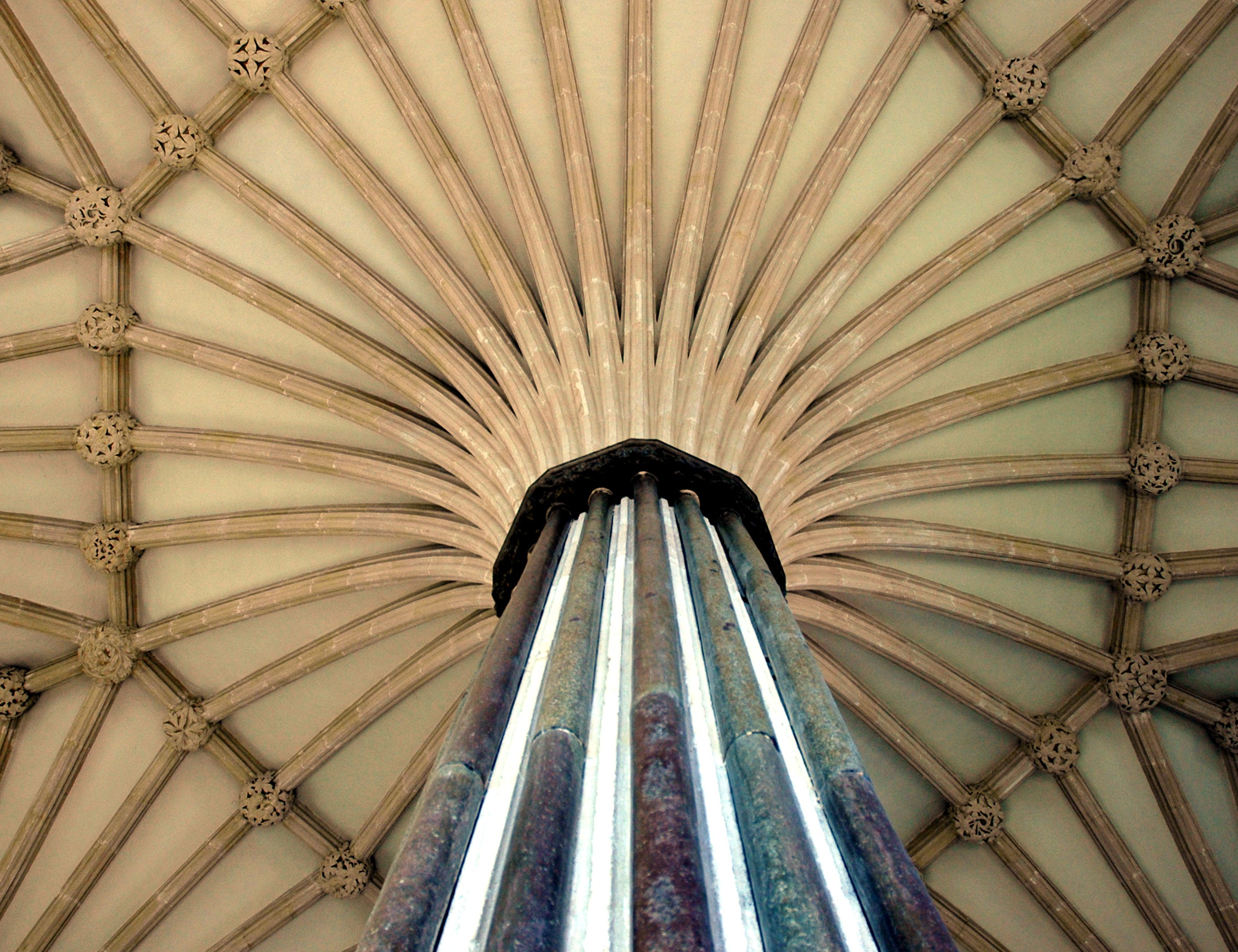 Catedral de Wells - Columna sala capitular